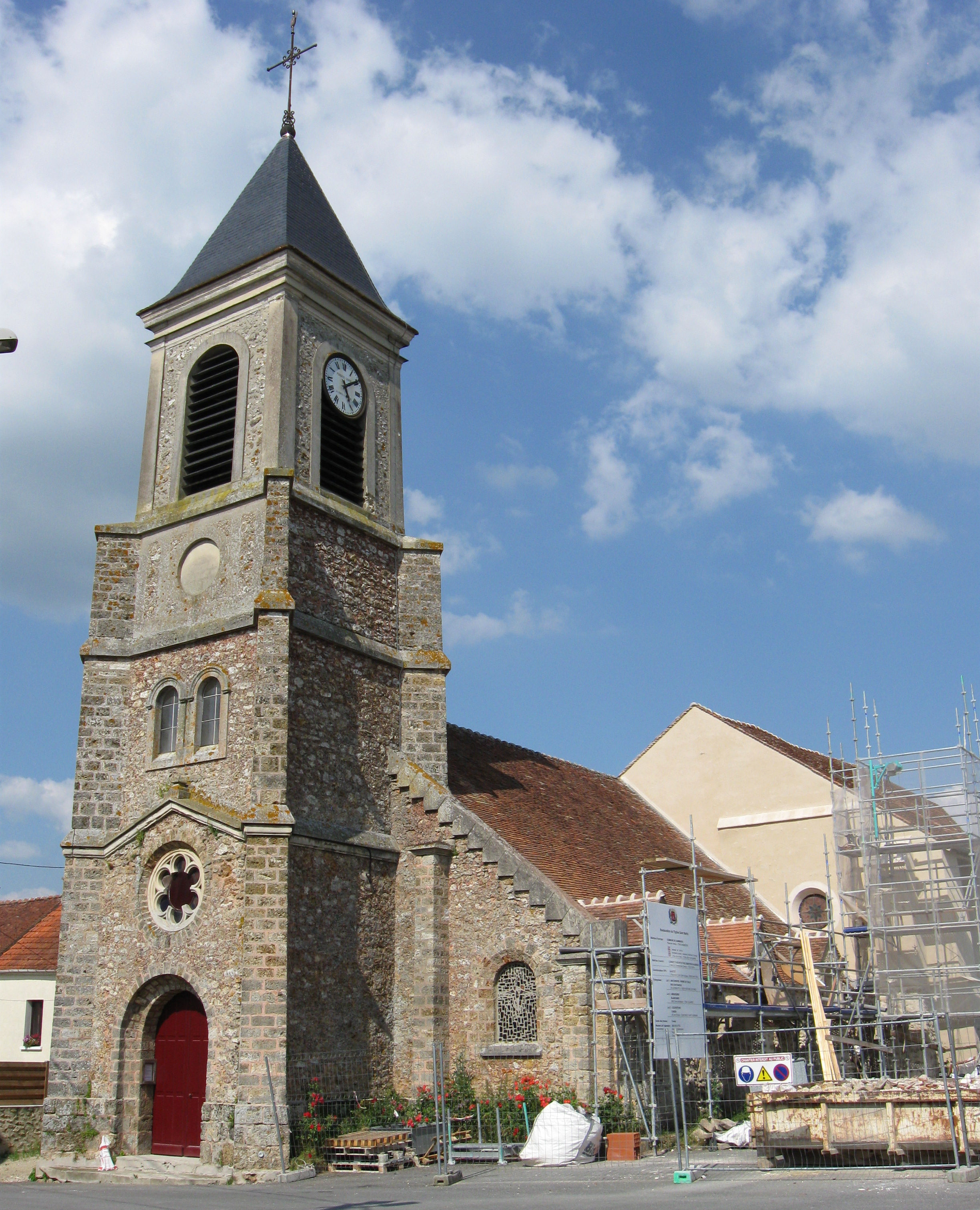 Église Saint-Martin de Sammeron. (département de la Seine-et-Marne, région Île-de-France).